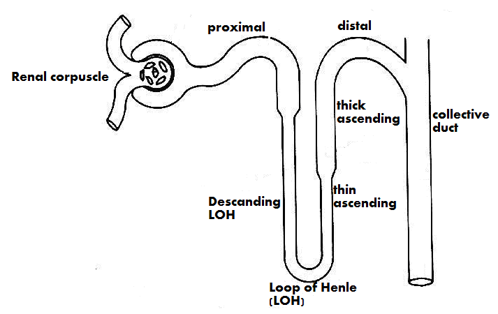 ציור של מערכת הכליות